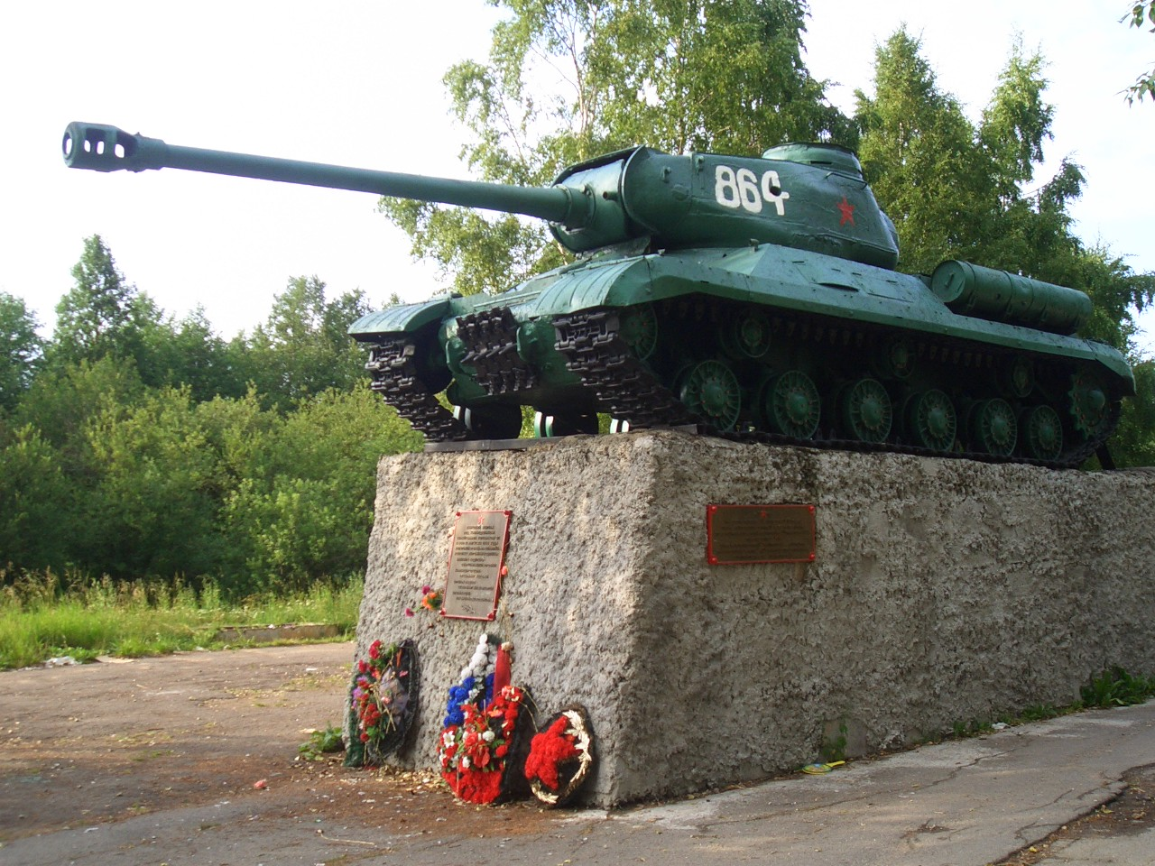 Танк ИС-2 на месте боя экипажа З. Г. Колобанова.